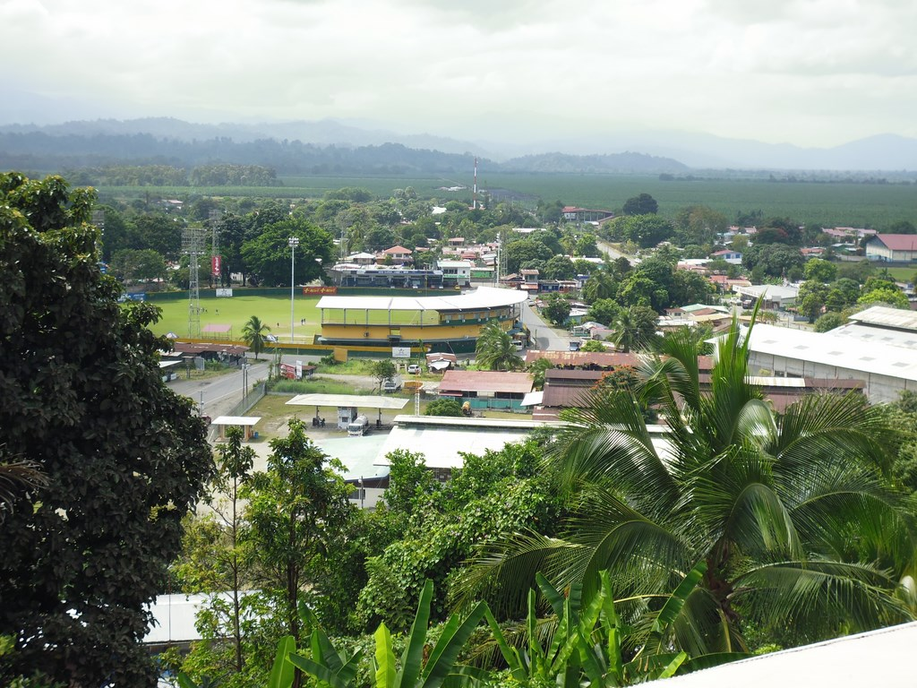 Foto de El Empalme